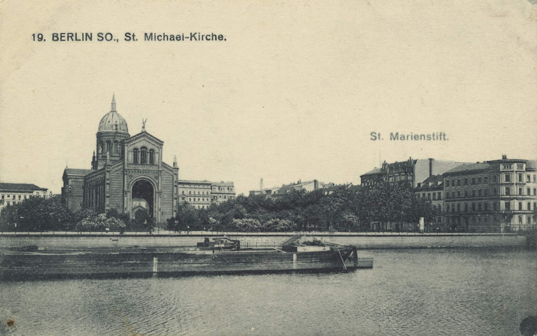 Sankt-Michael-Kirche am Luisenstädtischer Kanal in Berlin-Mitte